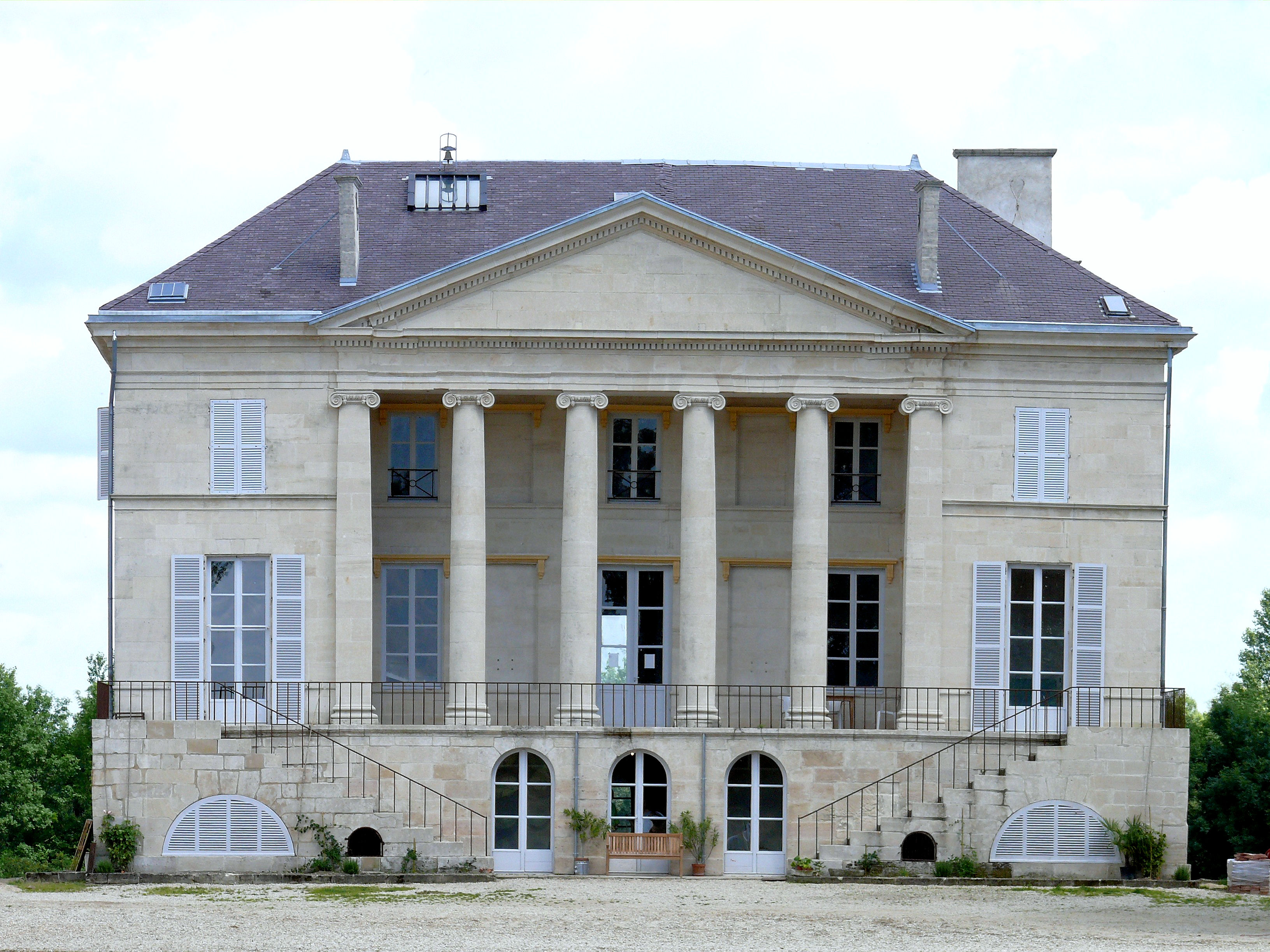 Château de Bignicourt-sur-Saulx